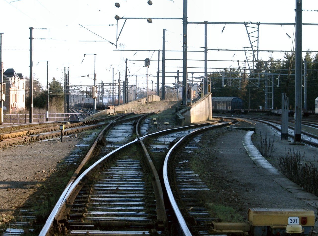 Sujet: Oflafbierg vum Péitenger Triage; Source: Eege Foto vum Pecalux